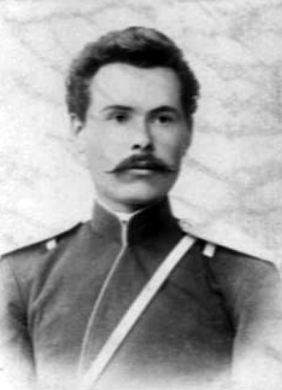 Иван Васильевич Заплатин (2 февраля 1872, Оренбургская губерния — после 1919) — подъесаул, маслоторговец, депутат II Государственной думы Российской империи от Оренбургской губернии (1907).